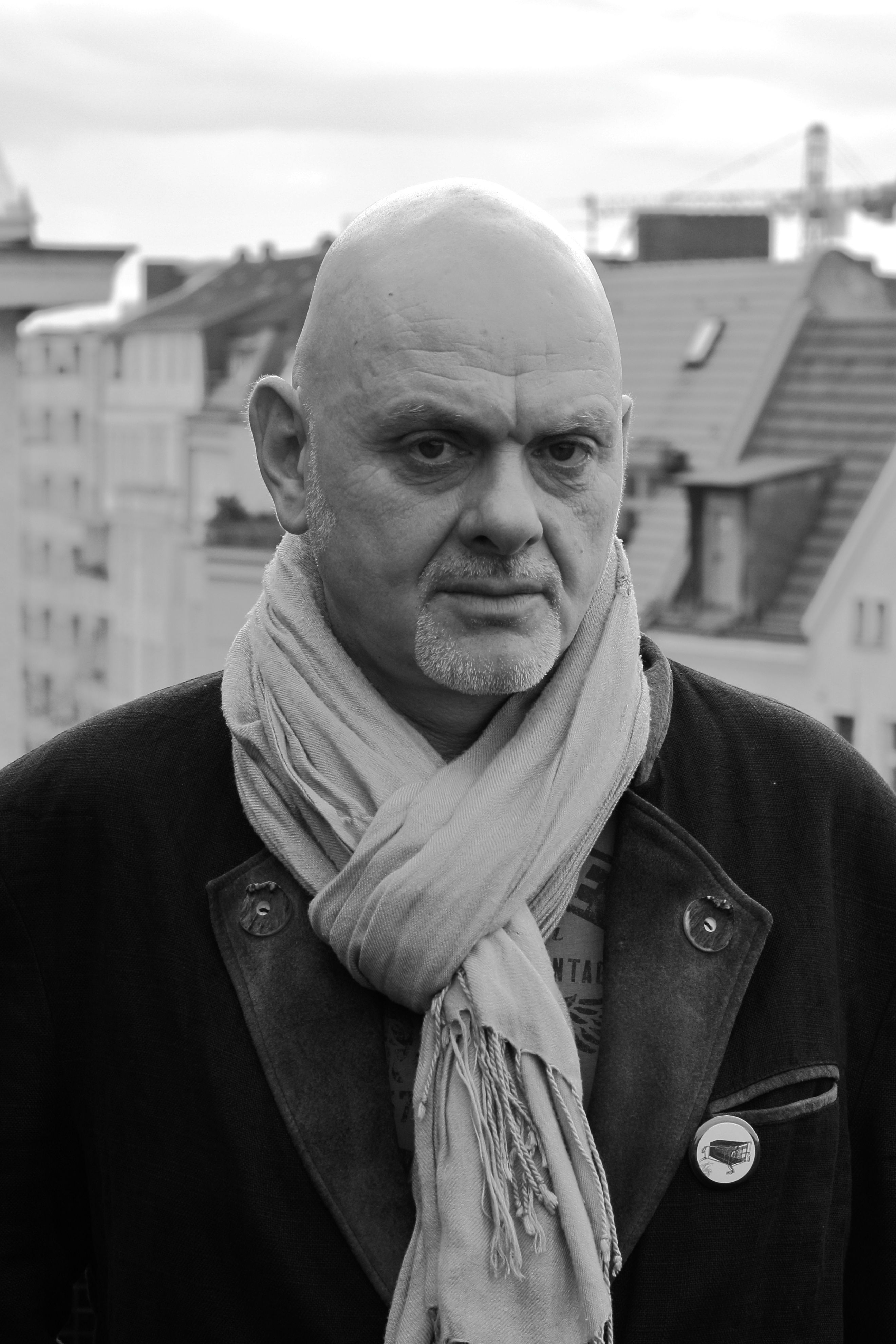 Jean-Yves Cendrey en 2014